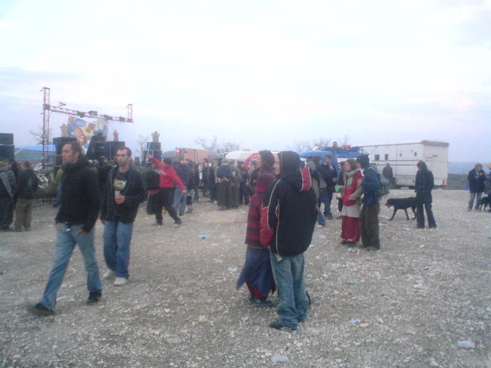 Photo de la Teuf des KnobZ et West unit a Cahors